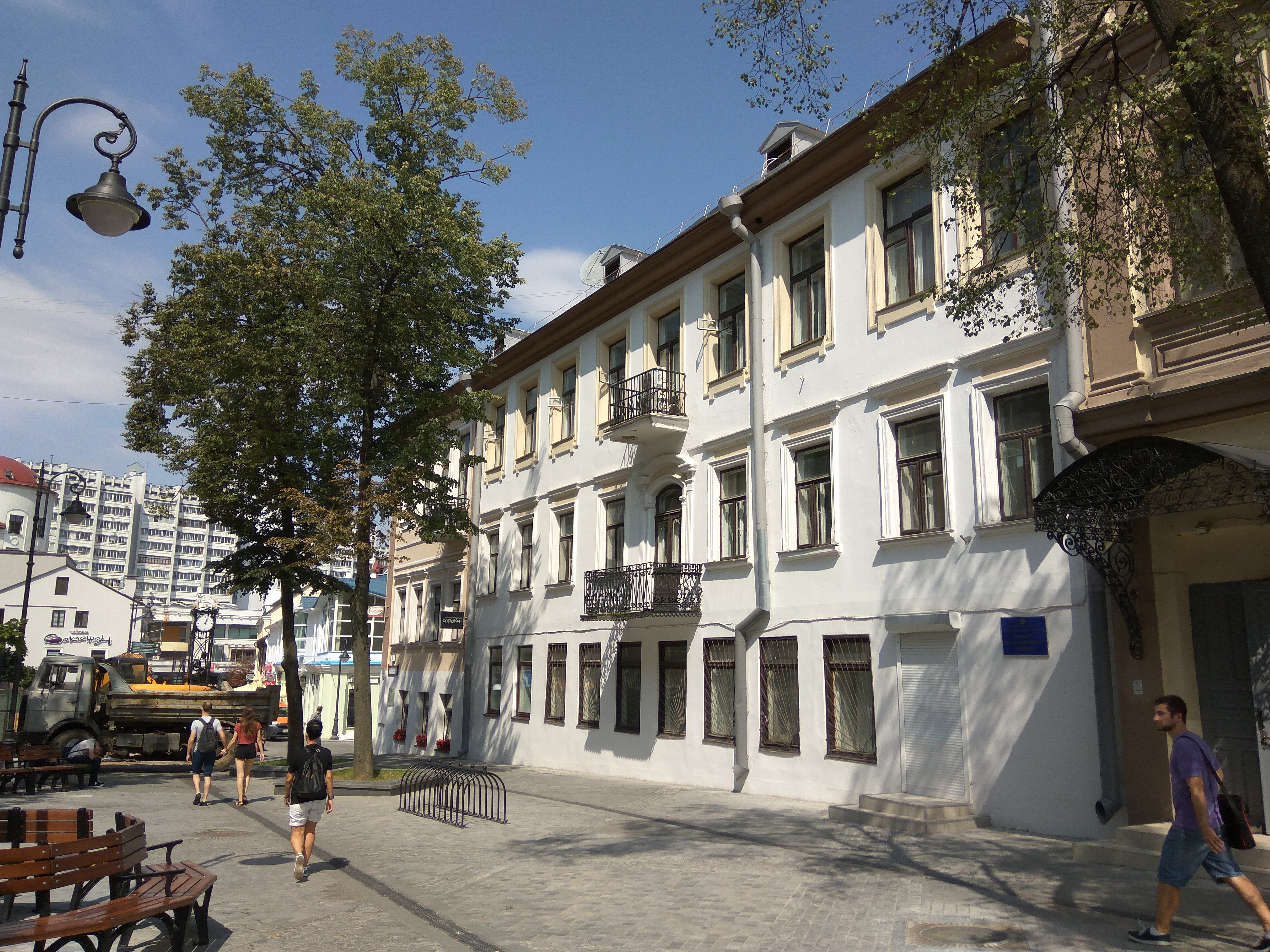 Мінск. Пешаходная Камсамольская (жнівень 2018)